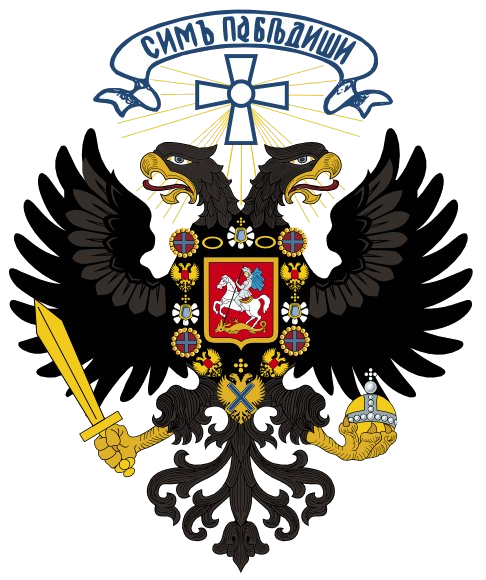 Проект российского герба 1919 года (правительство Колчака)